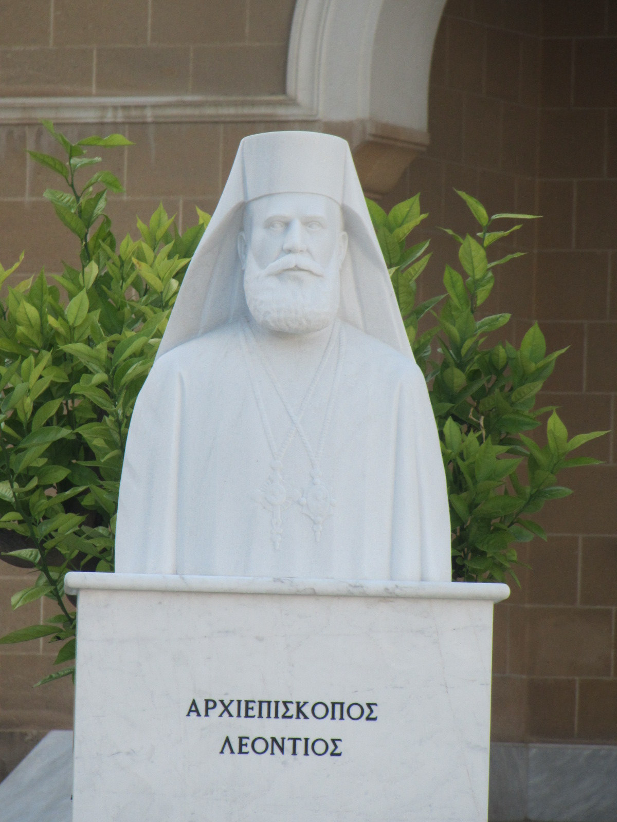 Nicosia by Paride